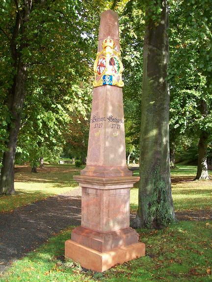 Kursächsische Postdistanzsäule Geithain Untertor nach der Restaurierung 2011